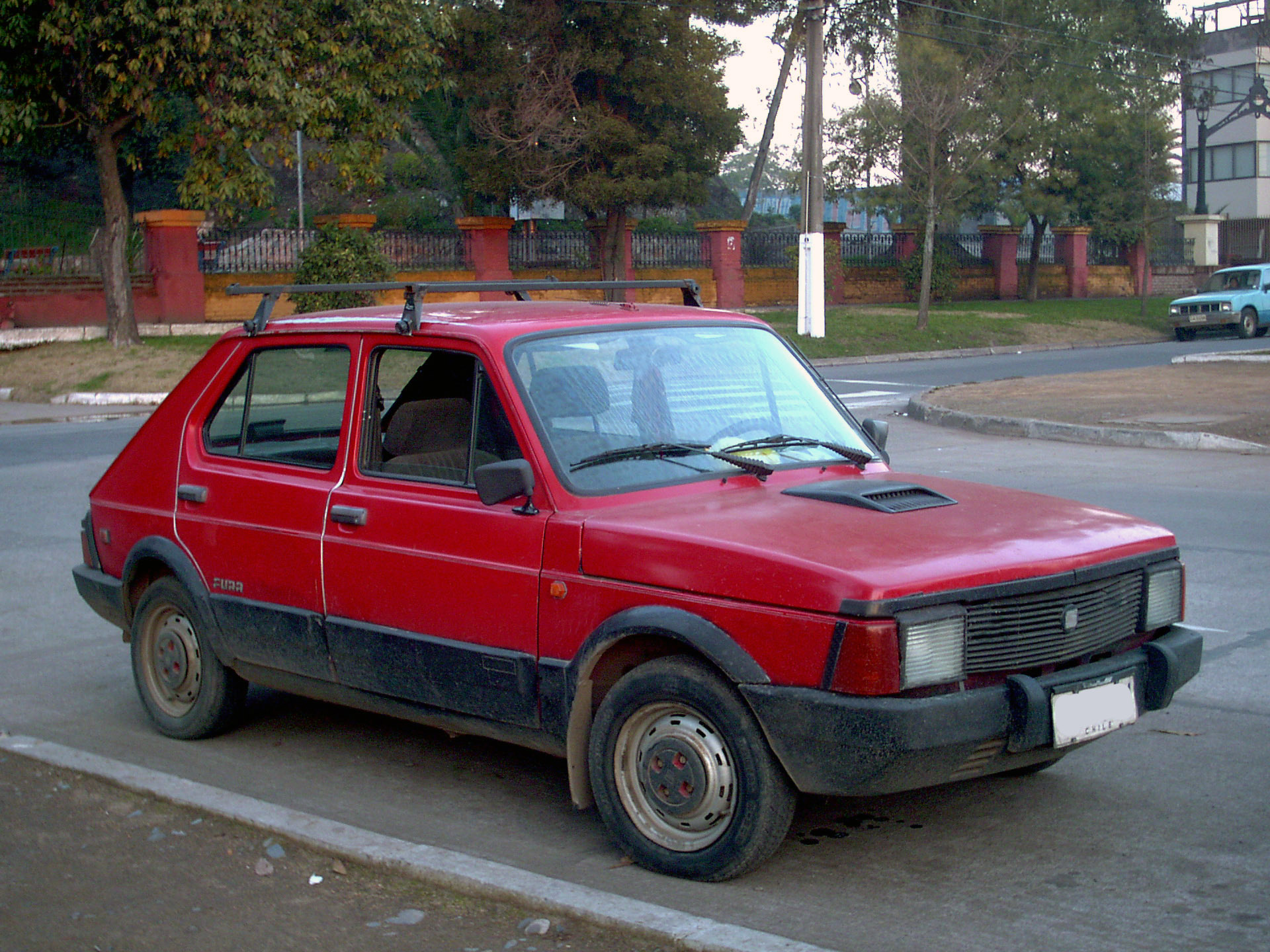 Seat Fura 850 1983